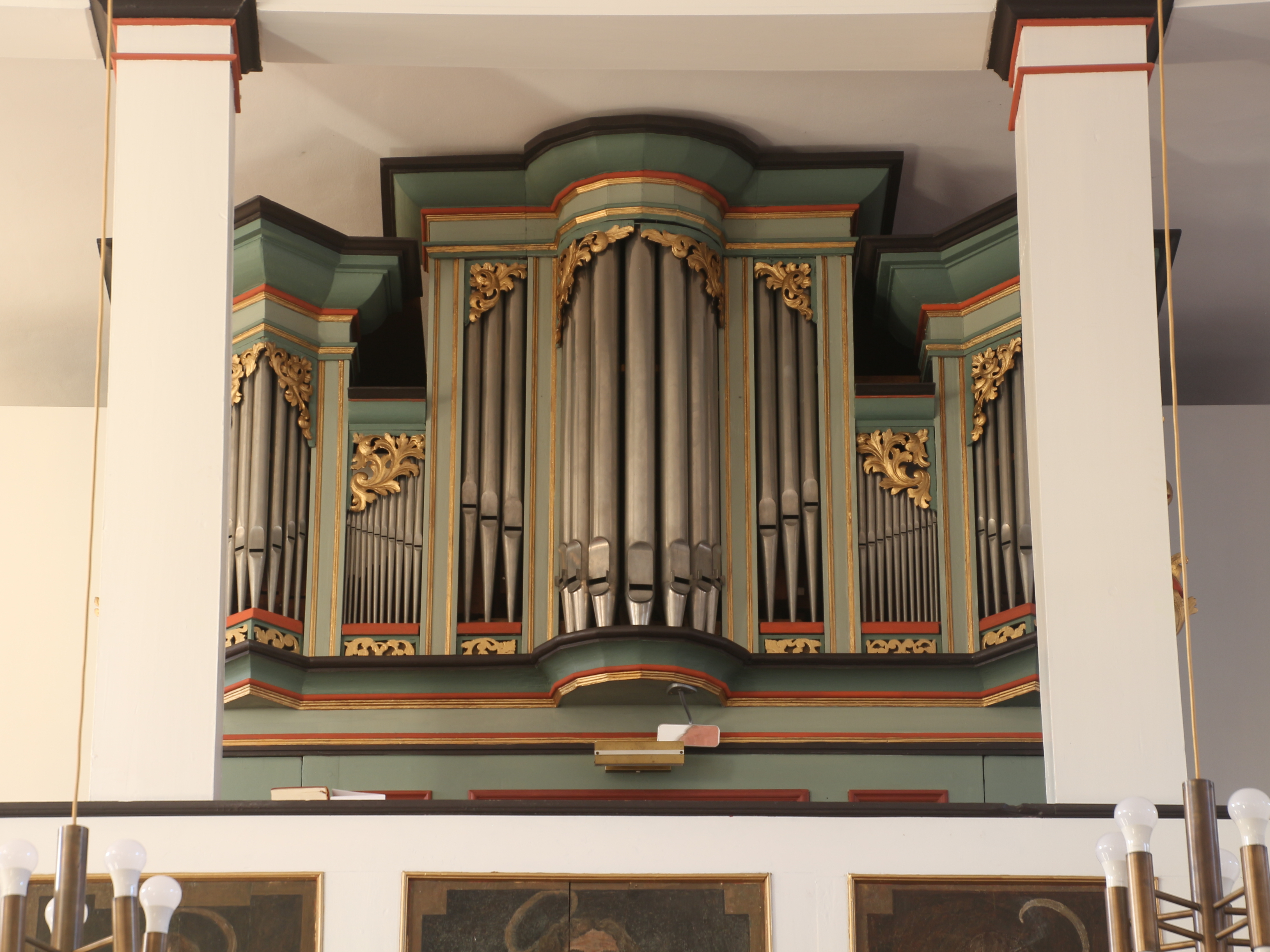 Evangelische Kirche Sterzhausen, Gemeinde Lahntal, Landkreis Marburg-Biedenkopf, Hessen